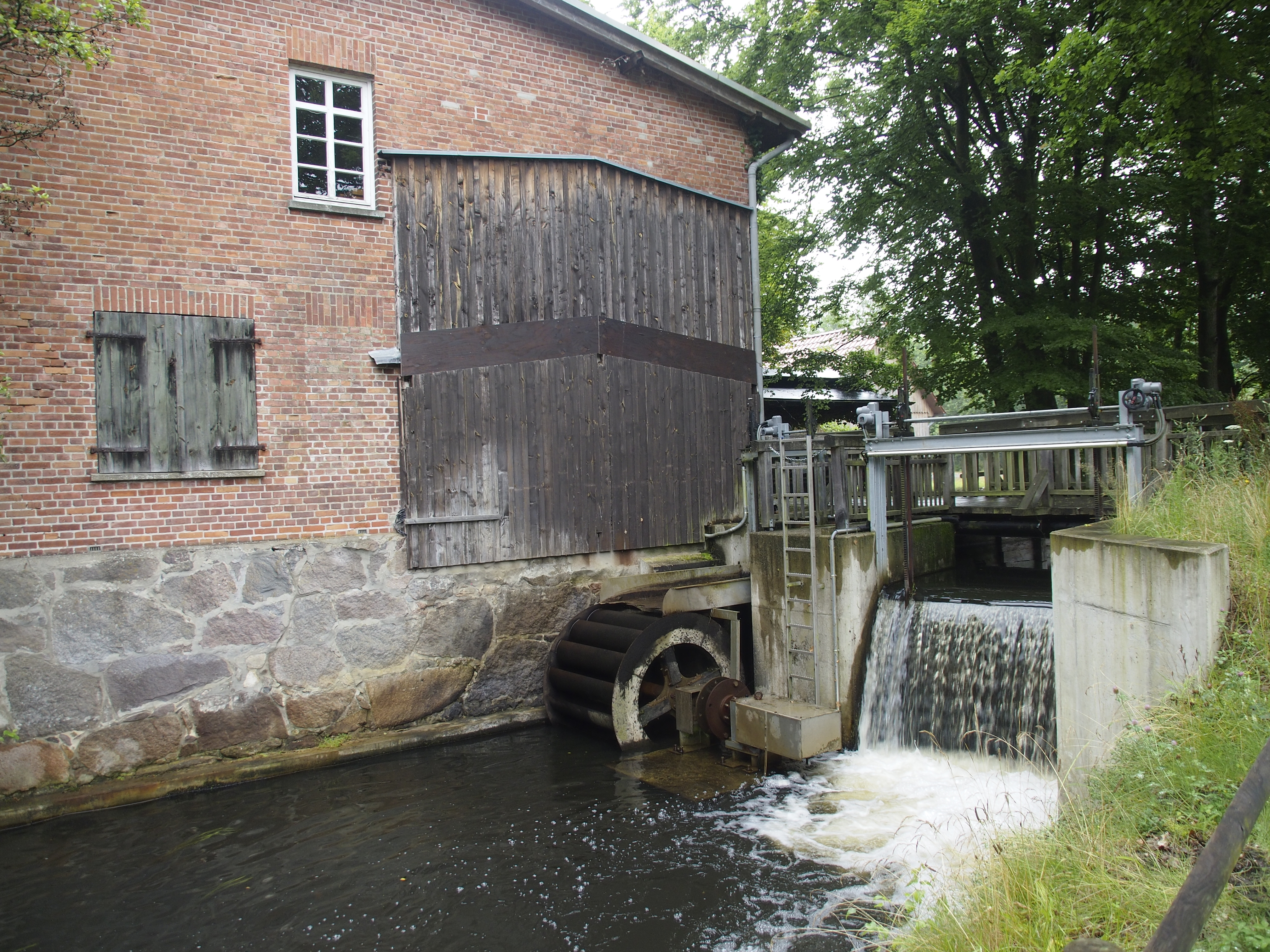 Sültinger Mühle mit Wehr und Wasserrad auf dem Truppenübungsplatz Munster-Süd